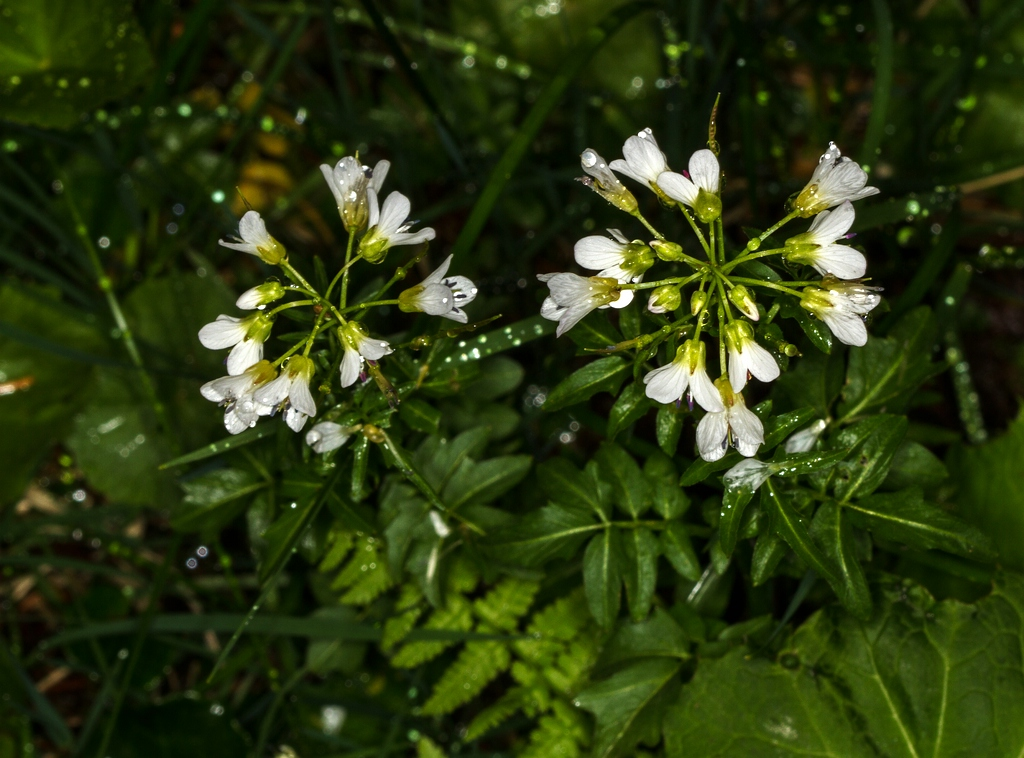 Bitteres Schaumkraut am_Naturlehrweg_Seebachtal